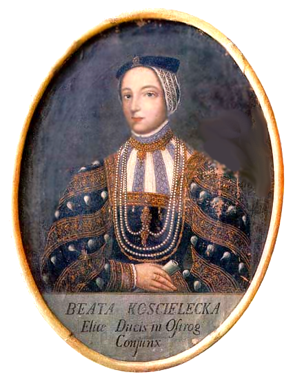 Beata Ostrogska z Kościeleckich